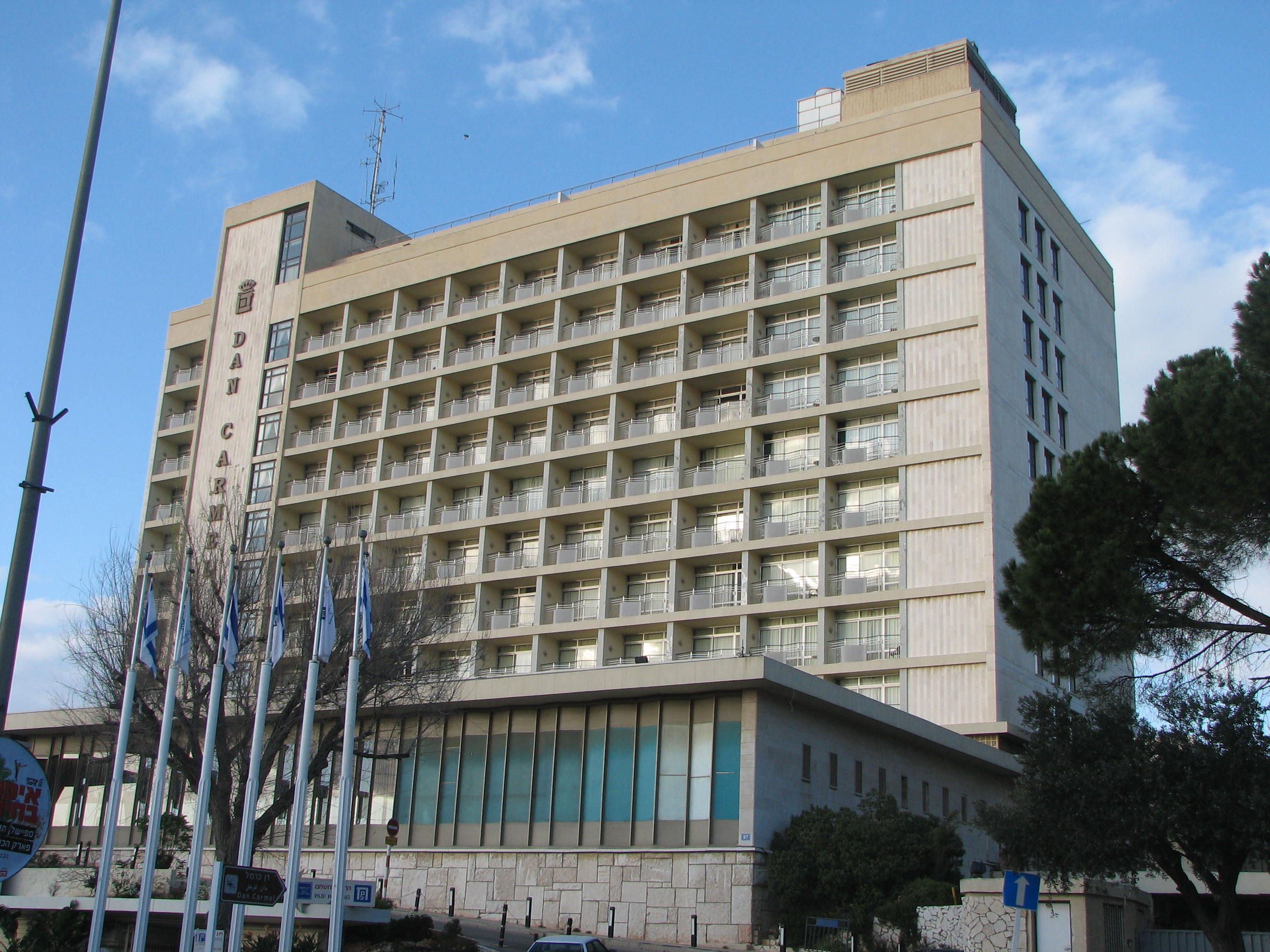 Dan Carmeת Hotel on Mount Carmel מלון דן כרמל על הר הכרמל בחיפה ישראל